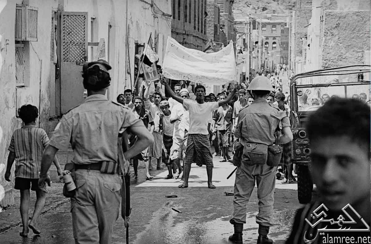 التواهي 8 مارس 1967